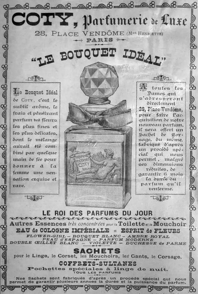 Advertisement in Lectures pour tous